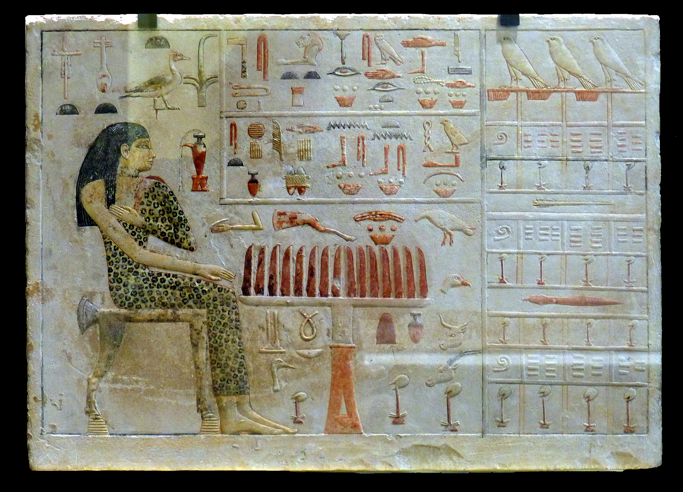 La princesse Néfertiabet devant son repas funéraire.